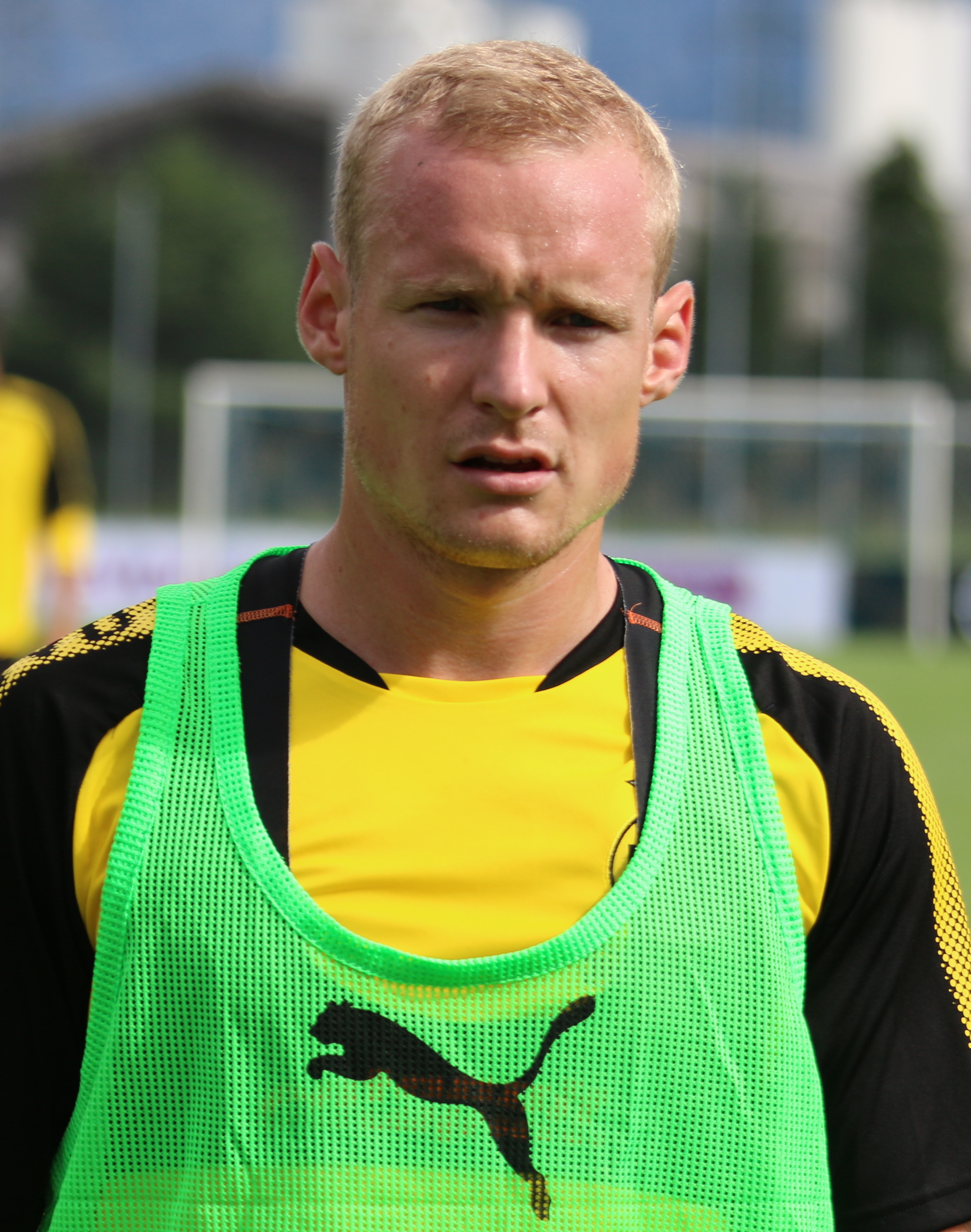 Sebastian Rode im Trainingslager in Bad Ragaz am 27.07.2017